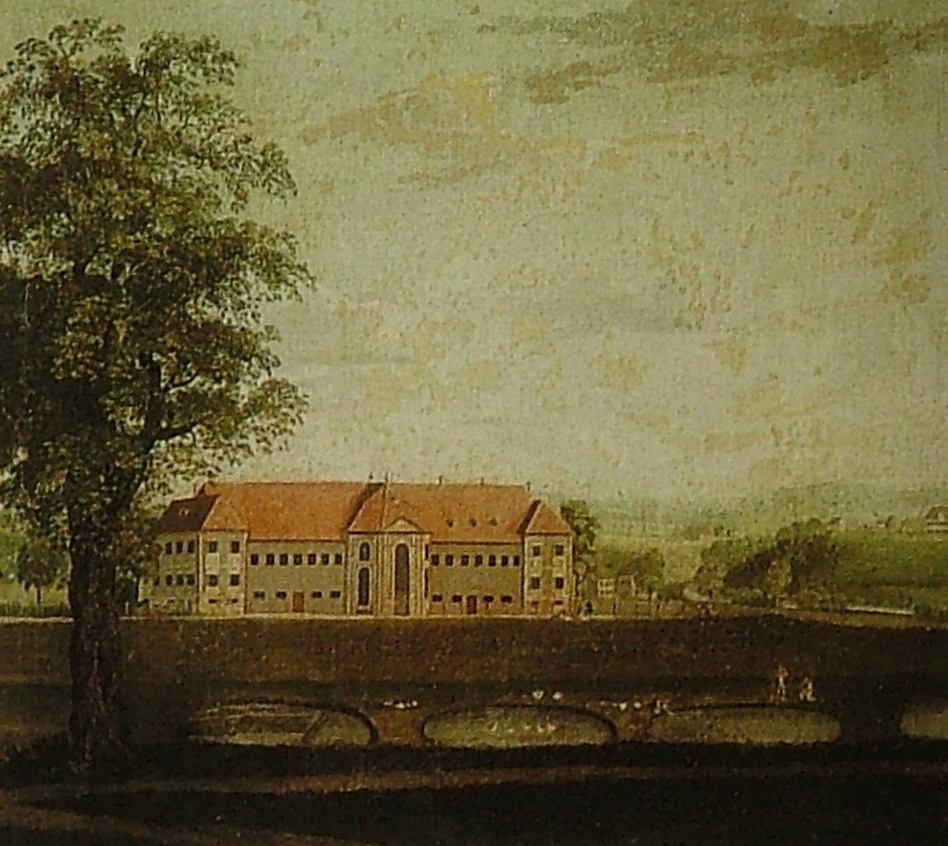 Kempten, Orangerie um 1800, links die damals noch junge Robinie